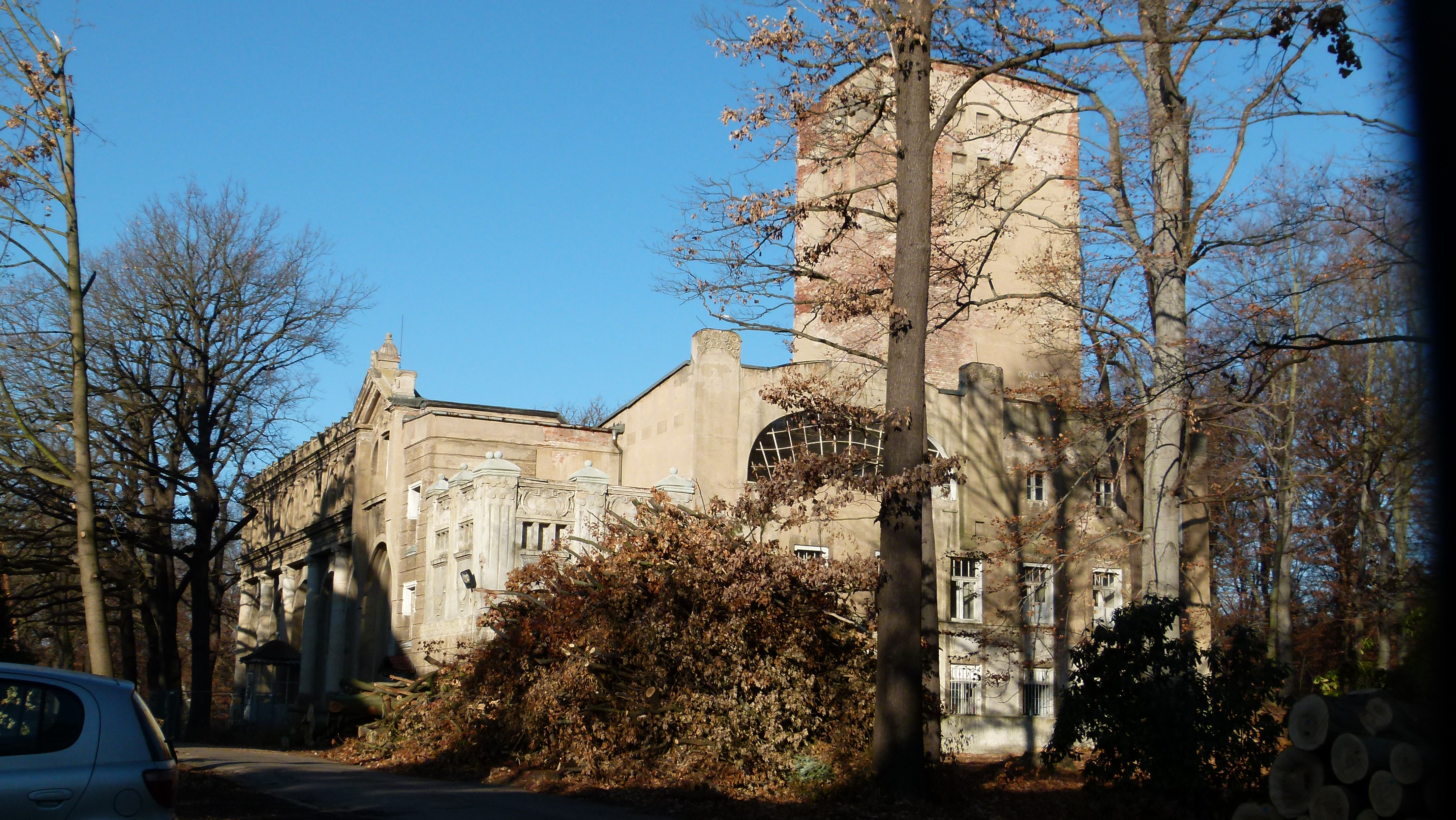 Lahmann-Sanatorium auf dem Weißen Hirsch, Dresden